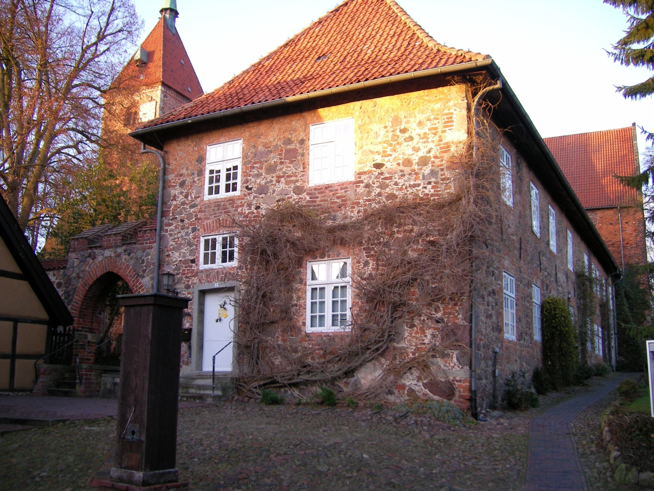 Remter in Wildeshausen (Seiteneingang)